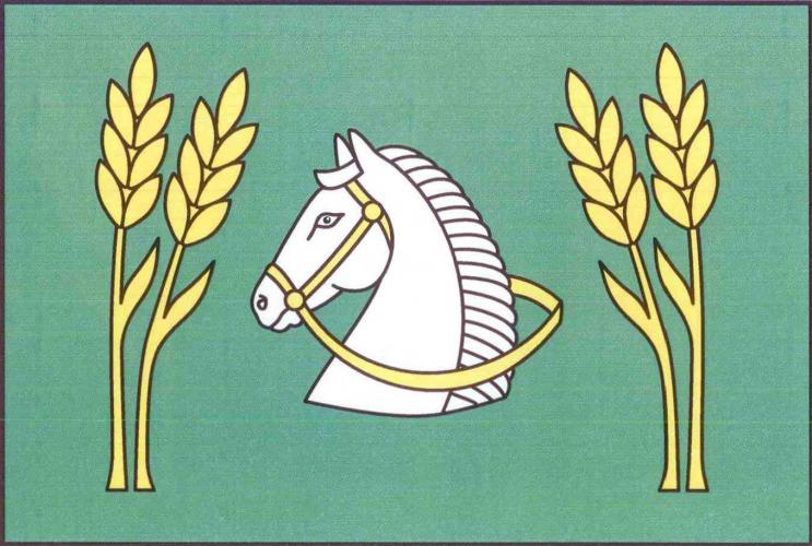 Bošice vlajka